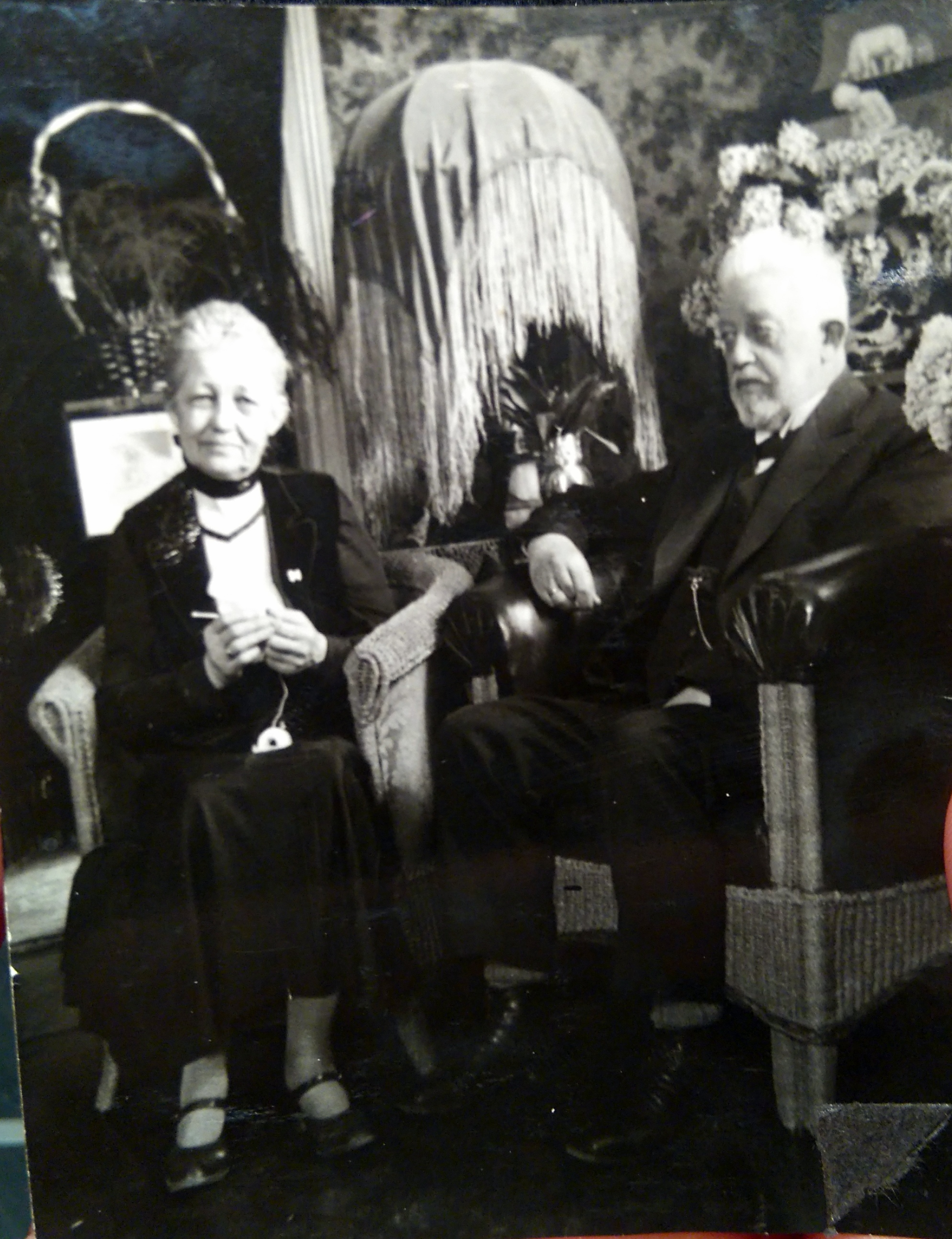 Elina og Ludvik Hundere Hermansen fotografert i sitt hjem i Moss.